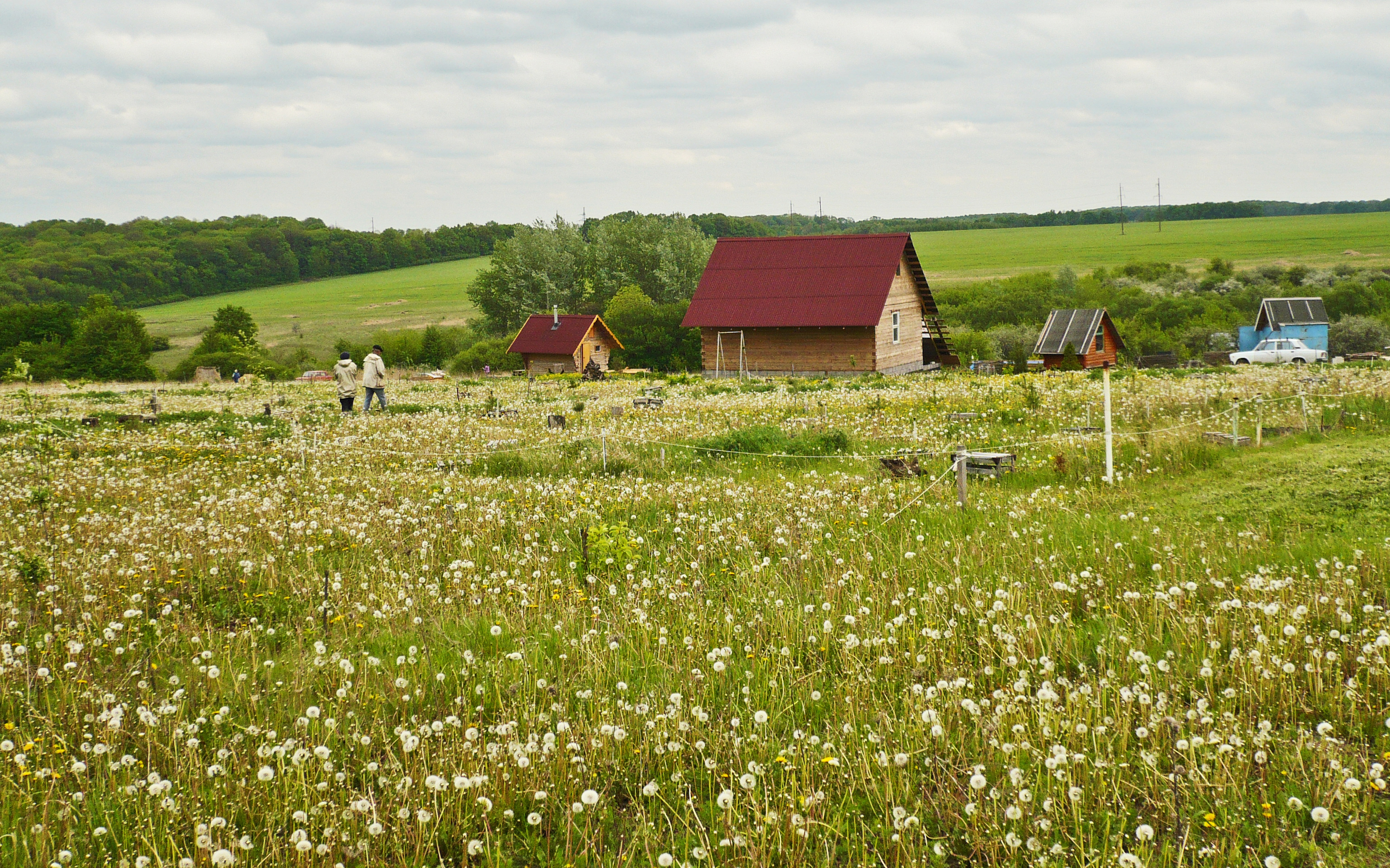 Родовое поместье: дом и баня из бруса, крытые андулином. Родовое экопоселение «Кореньские родники».